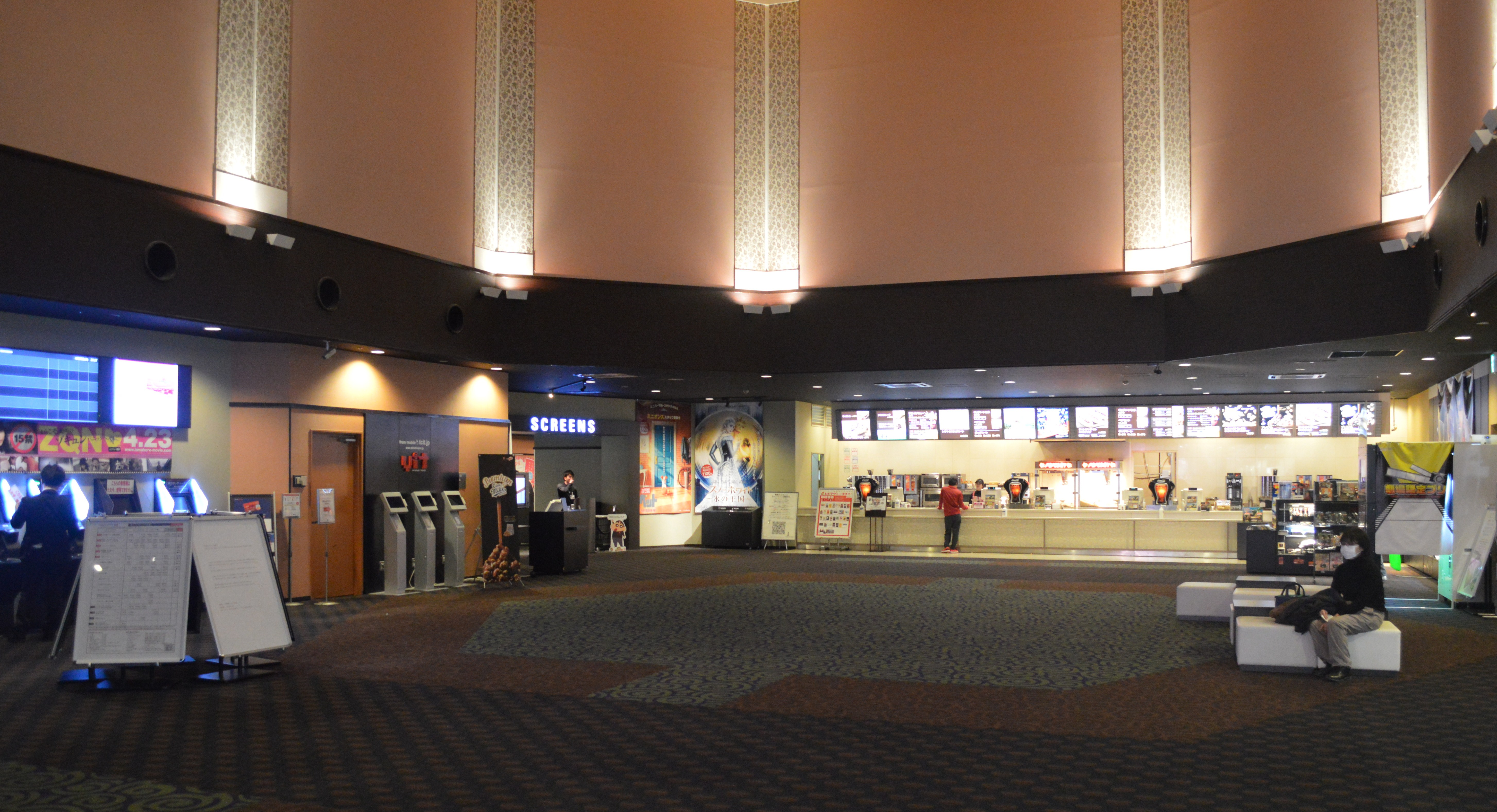 イオンモール東浦のTOHOシネマズ東浦（愛知県東浦町）